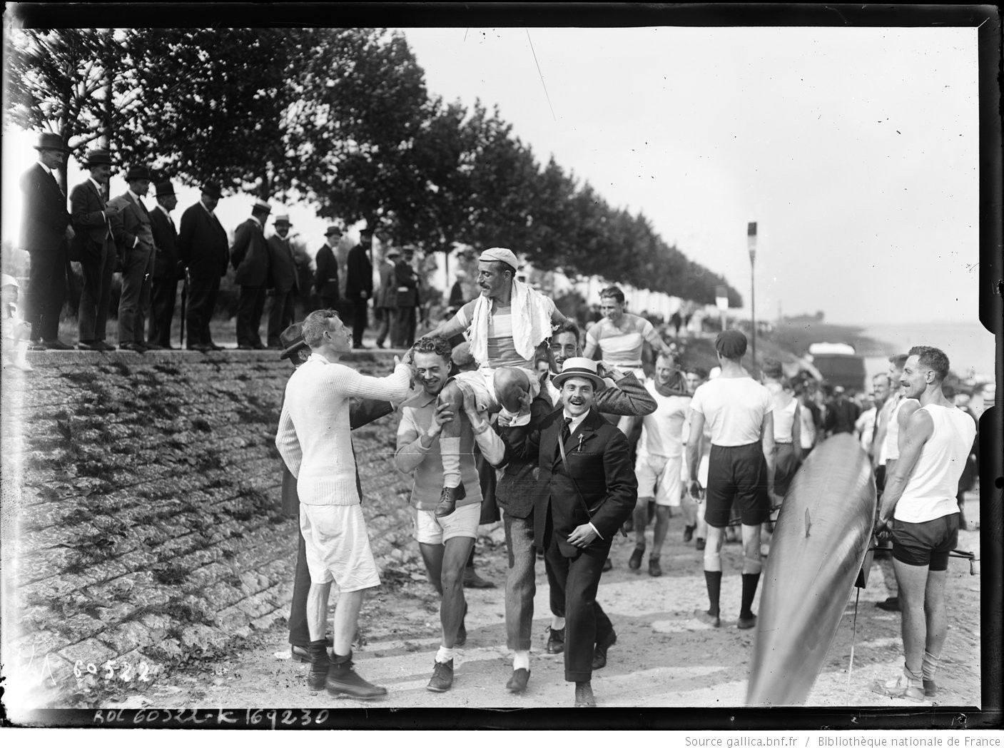 Poix et Bouton, gagnants du 2 de pointe avec barreur [Mâcon, 15/8/20, championnats d'Europe d'aviron] : [photographie de presse] / [Agence Rol]